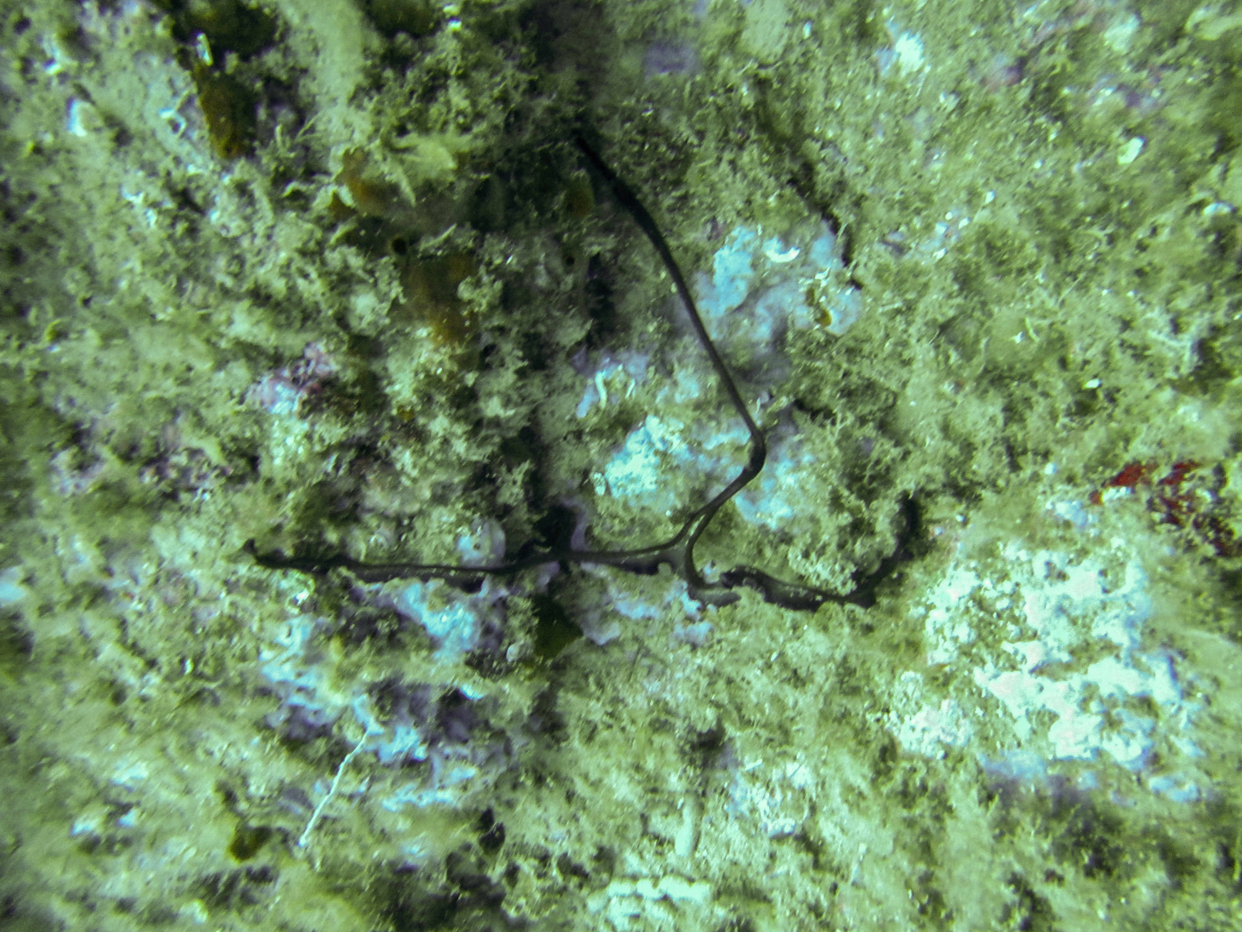 Une bonellie (Bonellia viridis) observé dans la Réserve Marine de Banyuls-sur-mer (Méditerranée).